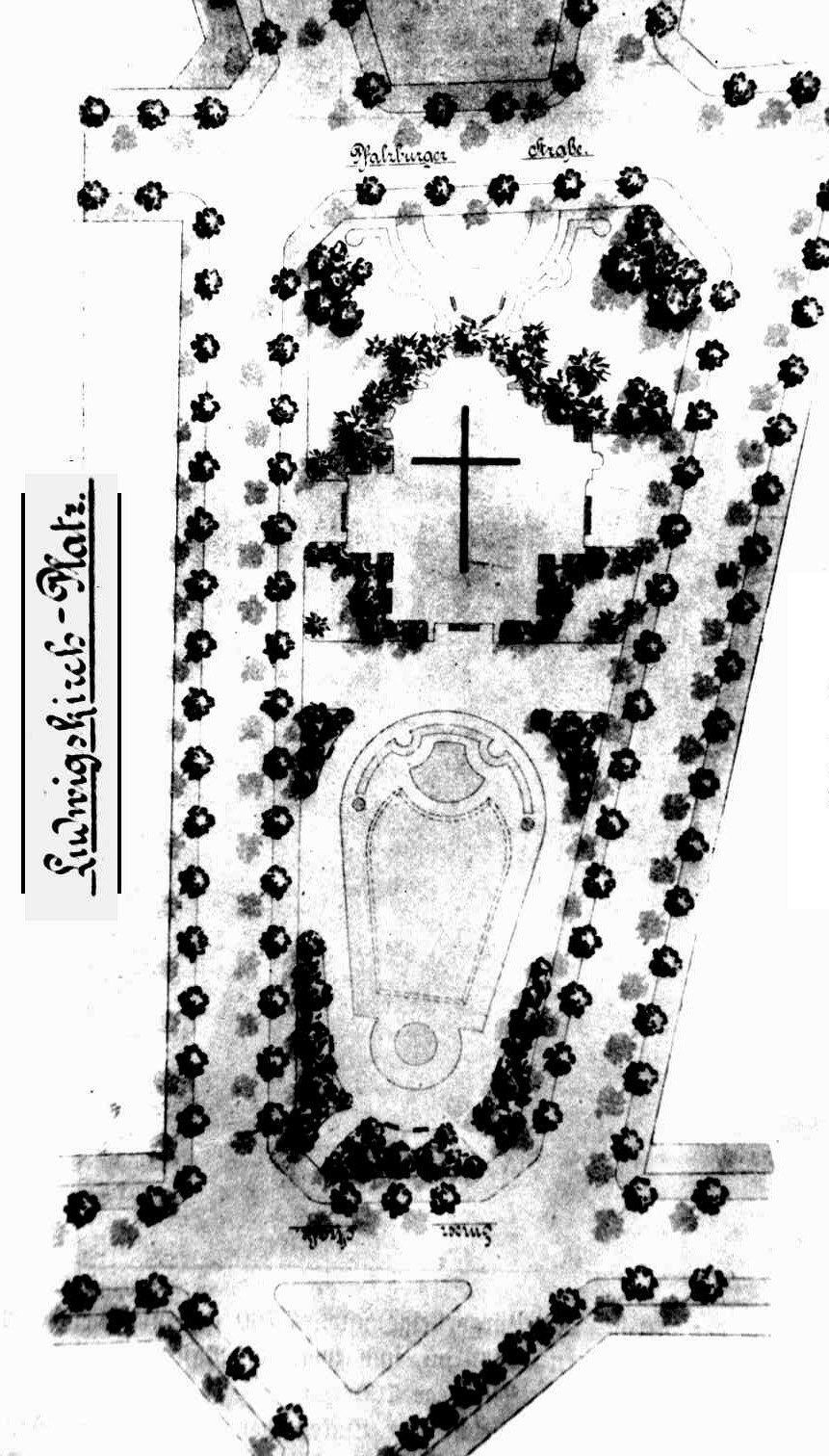 Lageplan der Gartenanlage der St. Ludwigskirche (1895-1897) in Berlin-Wilmersdorf. Der Kirchenbau stammt von dem Architekten August Menken (1858-1903).